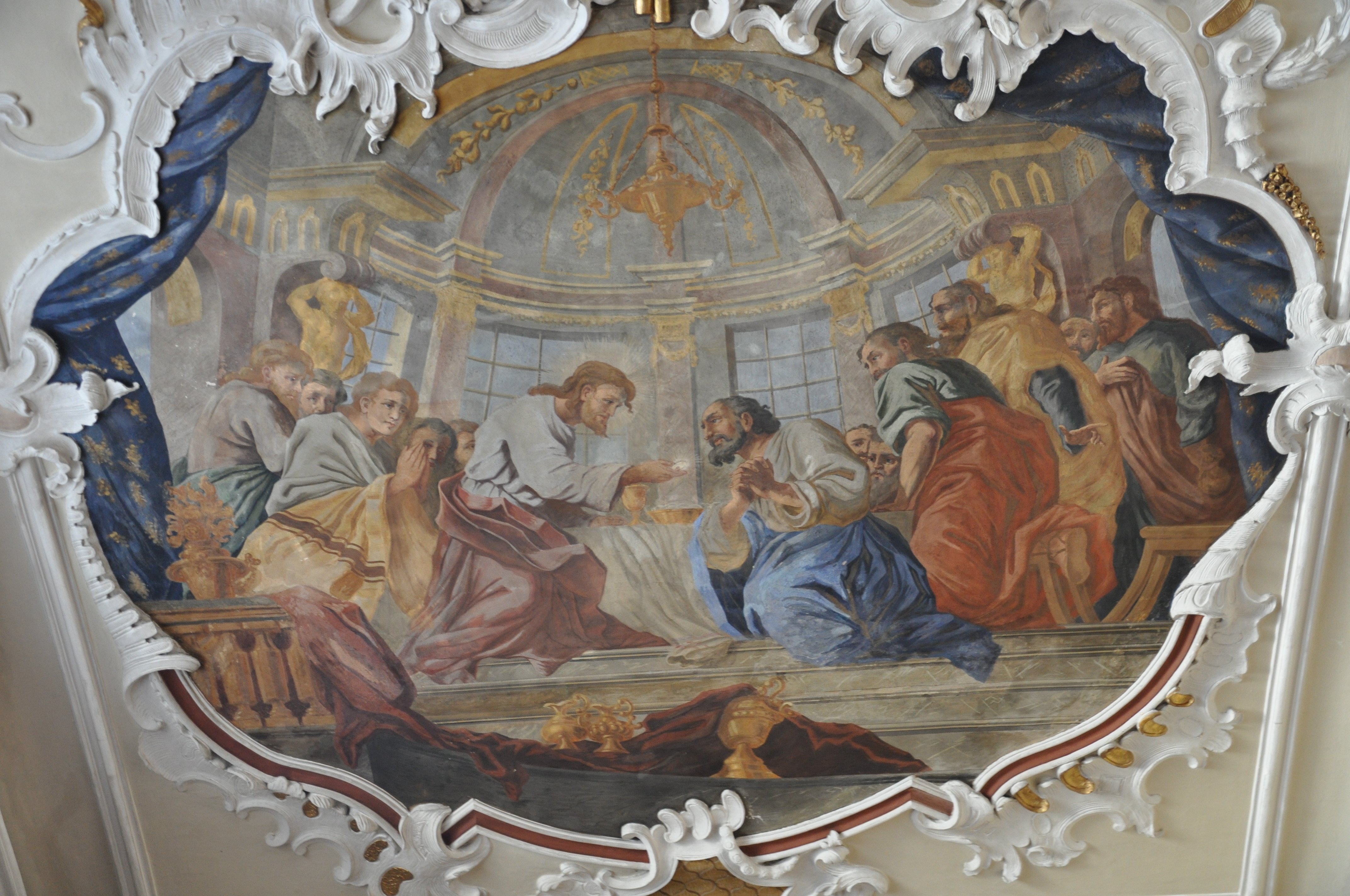 Pfullendorf, Stadtkirche St. Jakob; Fresko von Andreas Meinrad von Ow: Abendmahl, 1751